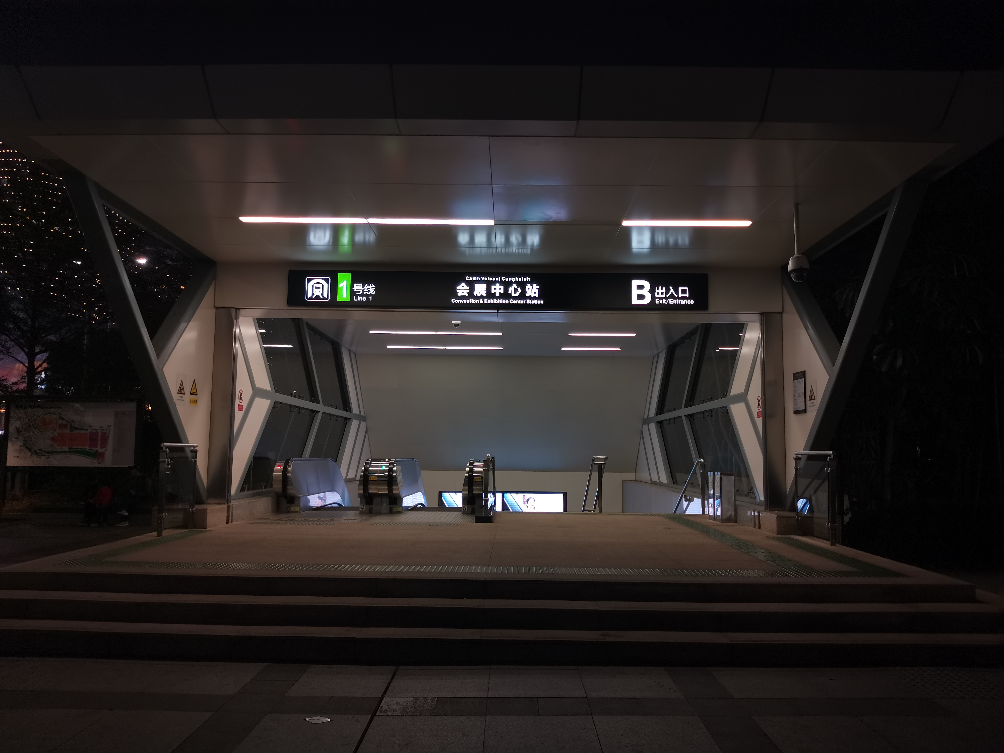 南宁轨道交通青秀山站站厅